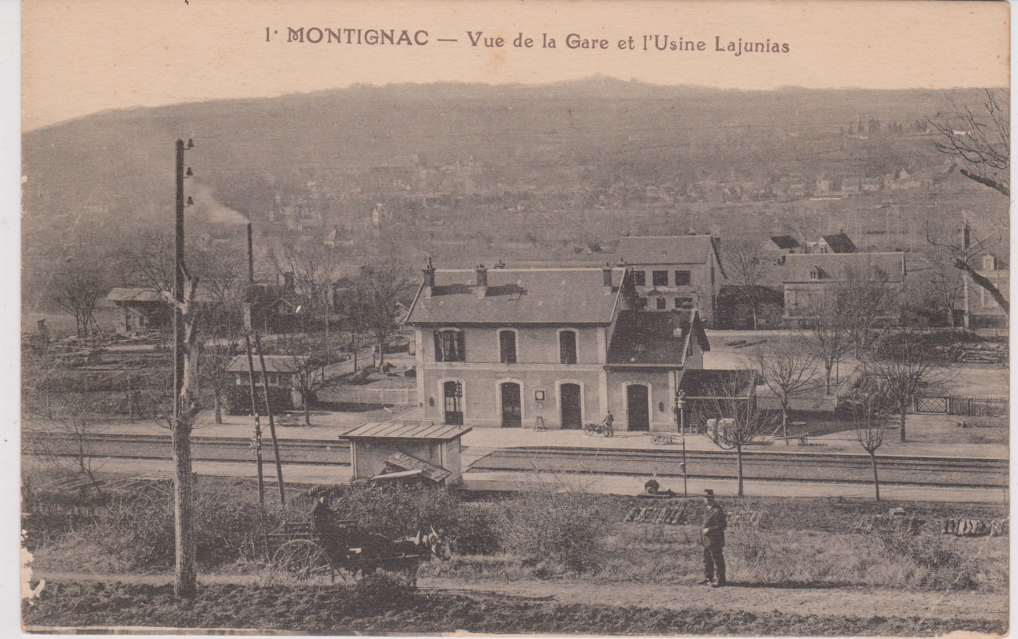 la gare de MONTIGNAC qui n'existe plus